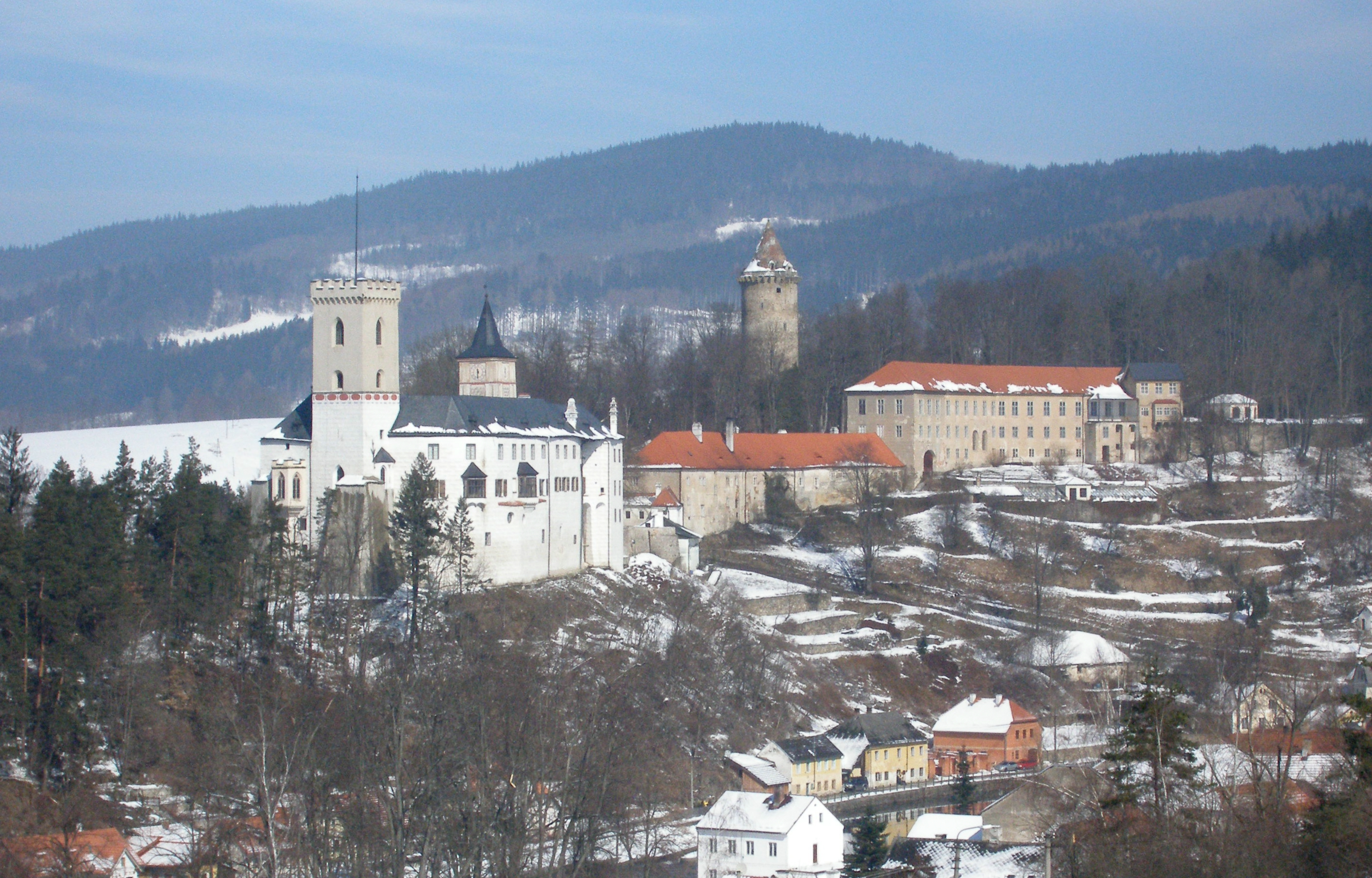 Rožmberk Castle (Rožmberk nad Vltavou, Czech Republic)